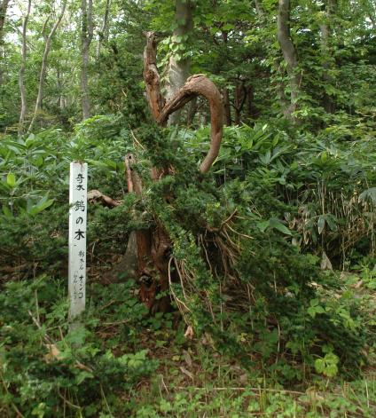 Ichii Tree, Yagishiri Isle., Hokkaido, Japan